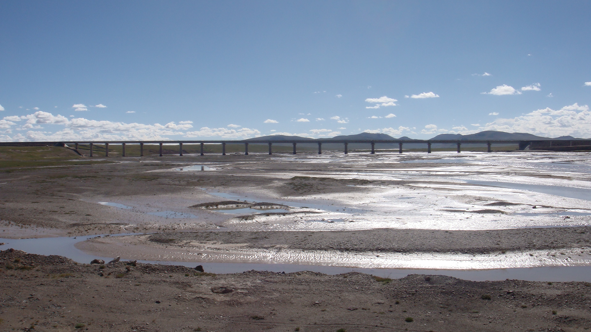 通天河大桥 Tongtian River Bridge China Xinjiang Urumqi Welcome you to tour the, Китай Синьцзяна Урумчи приветствовать Вас на экскурсию, الصين ترحب زيارتك لاورومتشى فى شينجيانغ, 中国新疆のウルムチへの訪問を歓迎する, 中国新疆乌鲁木齐欢迎您来观光旅游，